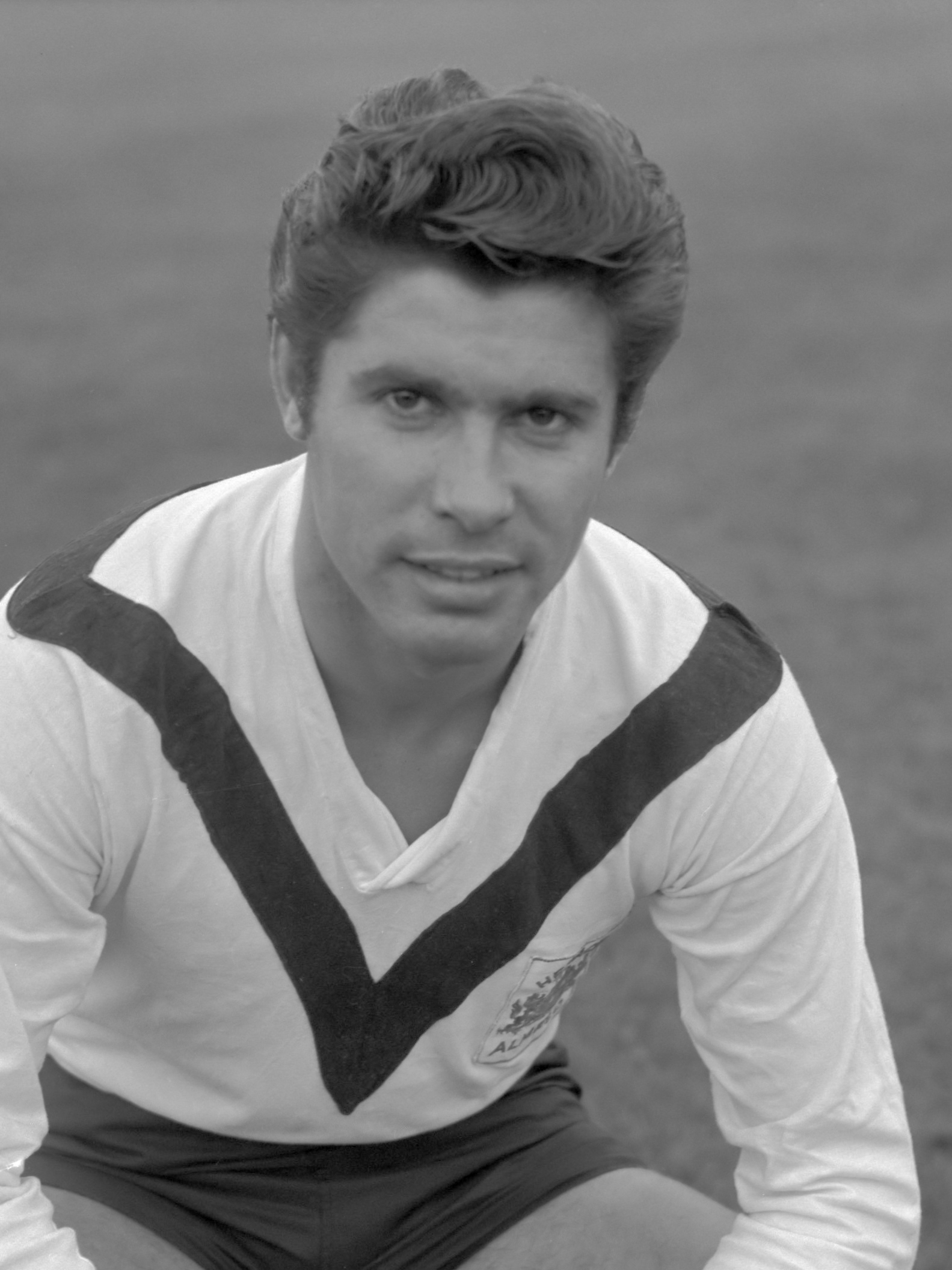 Sittardia tegen Heracles 1-4, Van Nee (Heracles) (kop) 20 september 1964